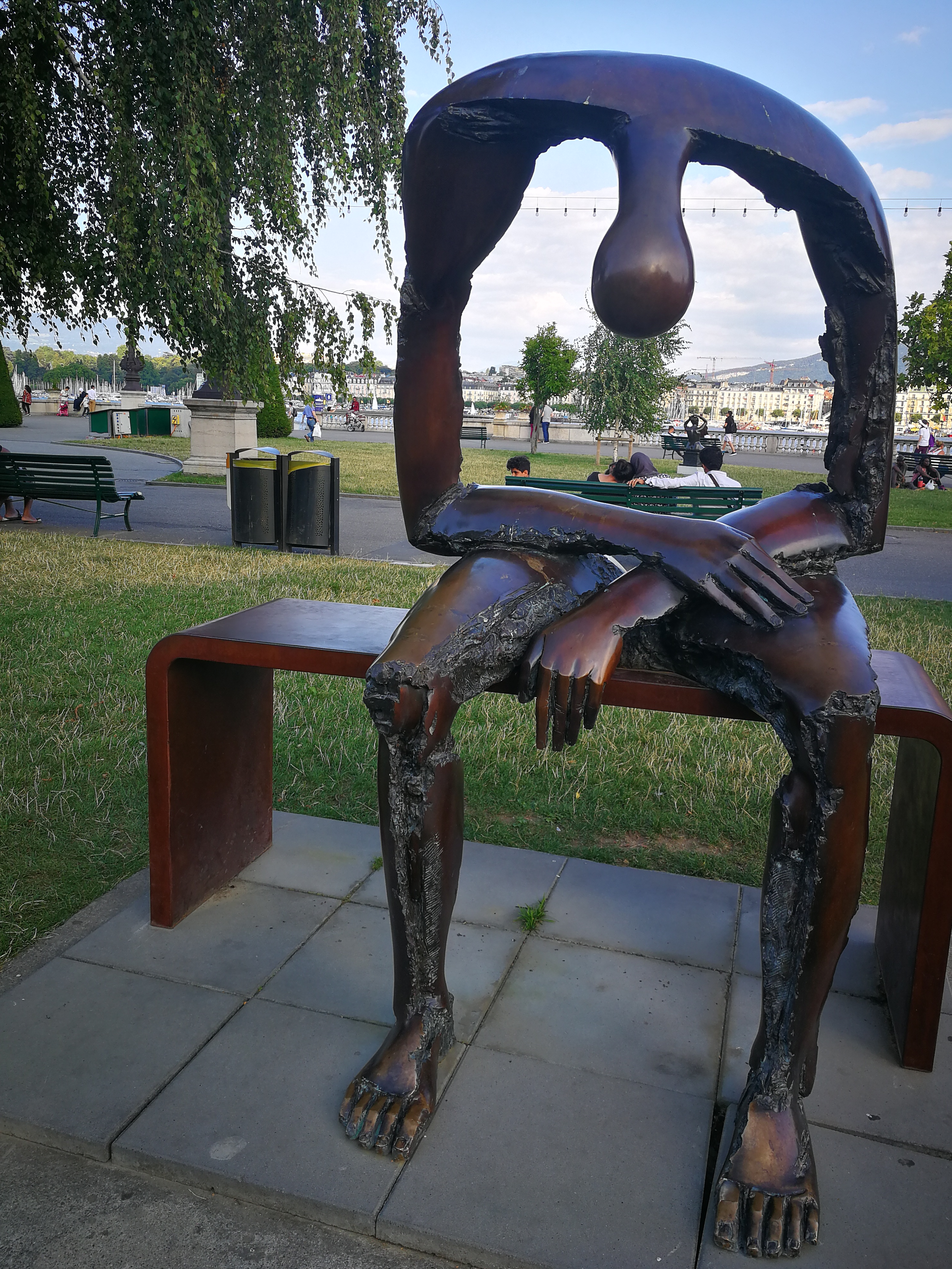 Genève, Suisse Artiste roumain et suisse, ce bronze prend place sur la Rotonde du Mont-Blanc, également nommée "Carré des sculpteurs" par l’Association des sculpteurs de Genève (ASdG).